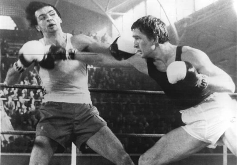 Kazimierz Szozerba, Karl-Heinz Krüger PI-Caf-1-3-81-frz-Warschau: DDR-Boxer erreichten 12:12 - Karl-Heinz Krüger gewann im Weltergewicht - In einem Länderkampf zwischen Boxern der VR Polen und der DDR trennten sich beide Mannschaften mit 12:12. Punkte für die DDR-Staffel erkämpfte im Weltergewicht Karl-Heinz Krüger (r.), links Kazimierz Szozerba. Information added by Wikimedia users.